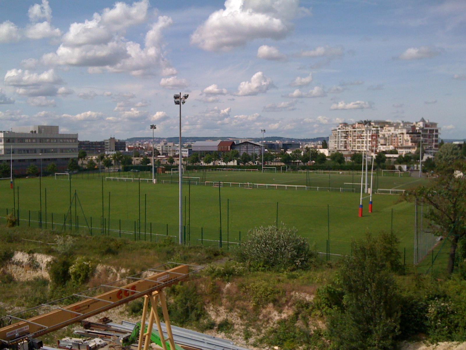 Stade des Bouvets à Nanterre, emplacement du projet Arena Stadium